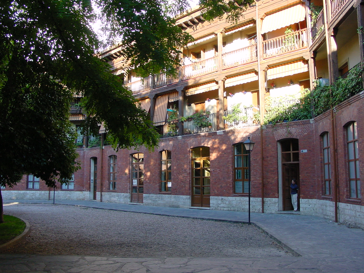 Antigua plaza de toros de Valladolid, convertida en viviendas .